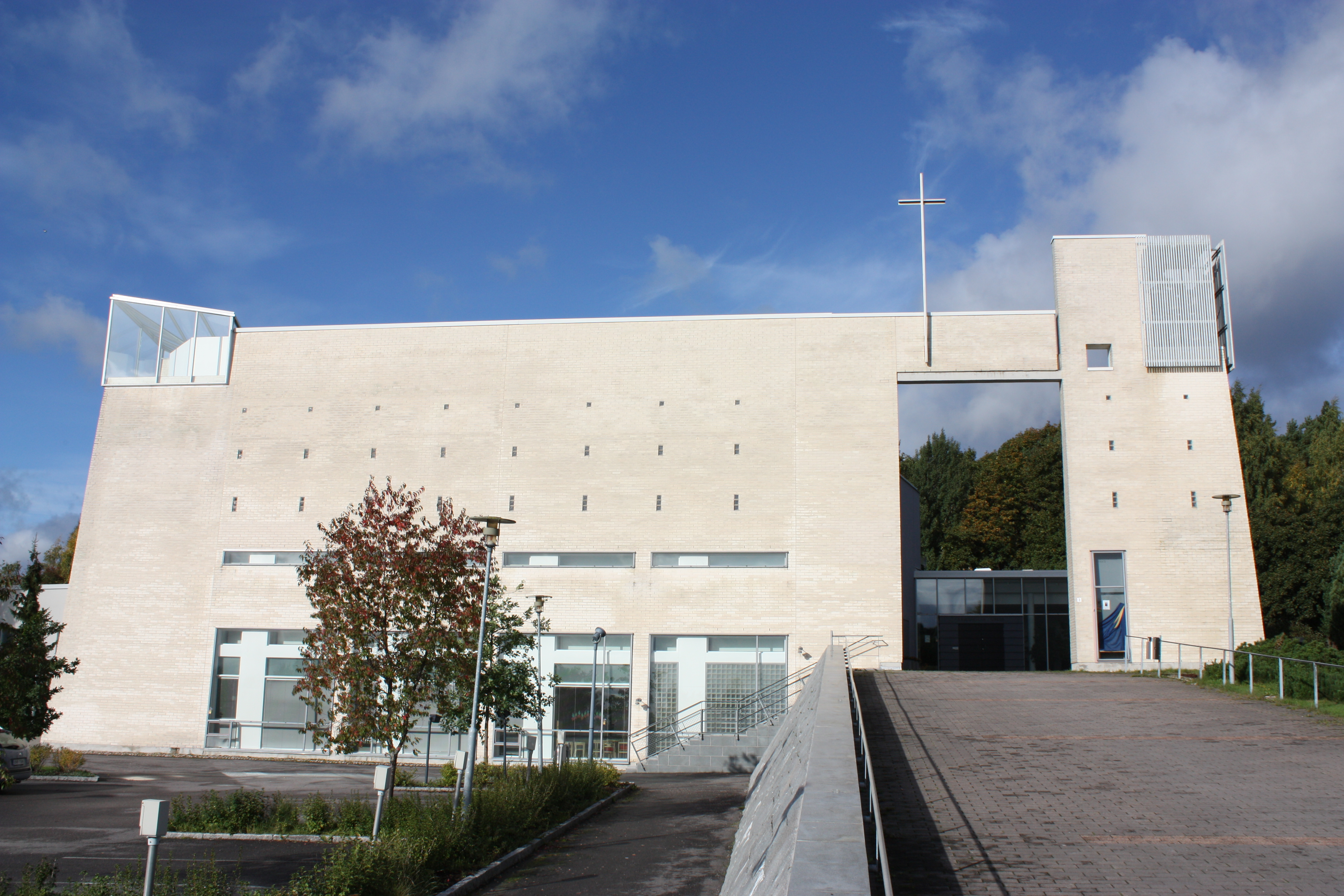 Hämeenkylän kirkko